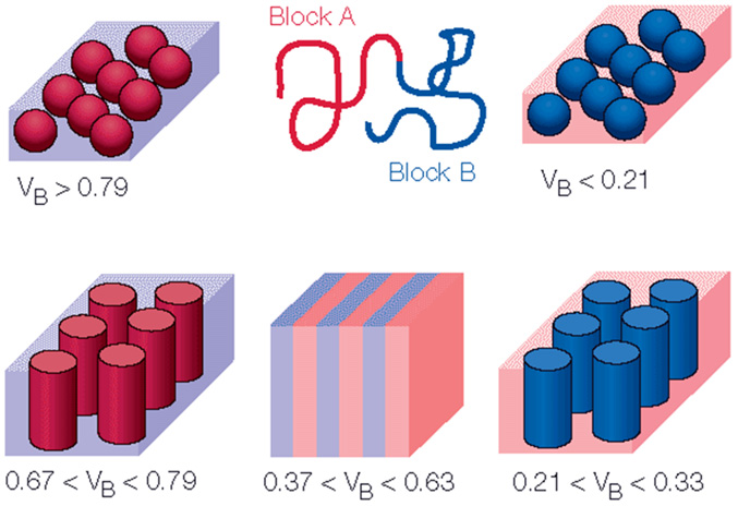 Diblokk kopolümeerida morfologiad erinevate ruumifraktsioonide korral.